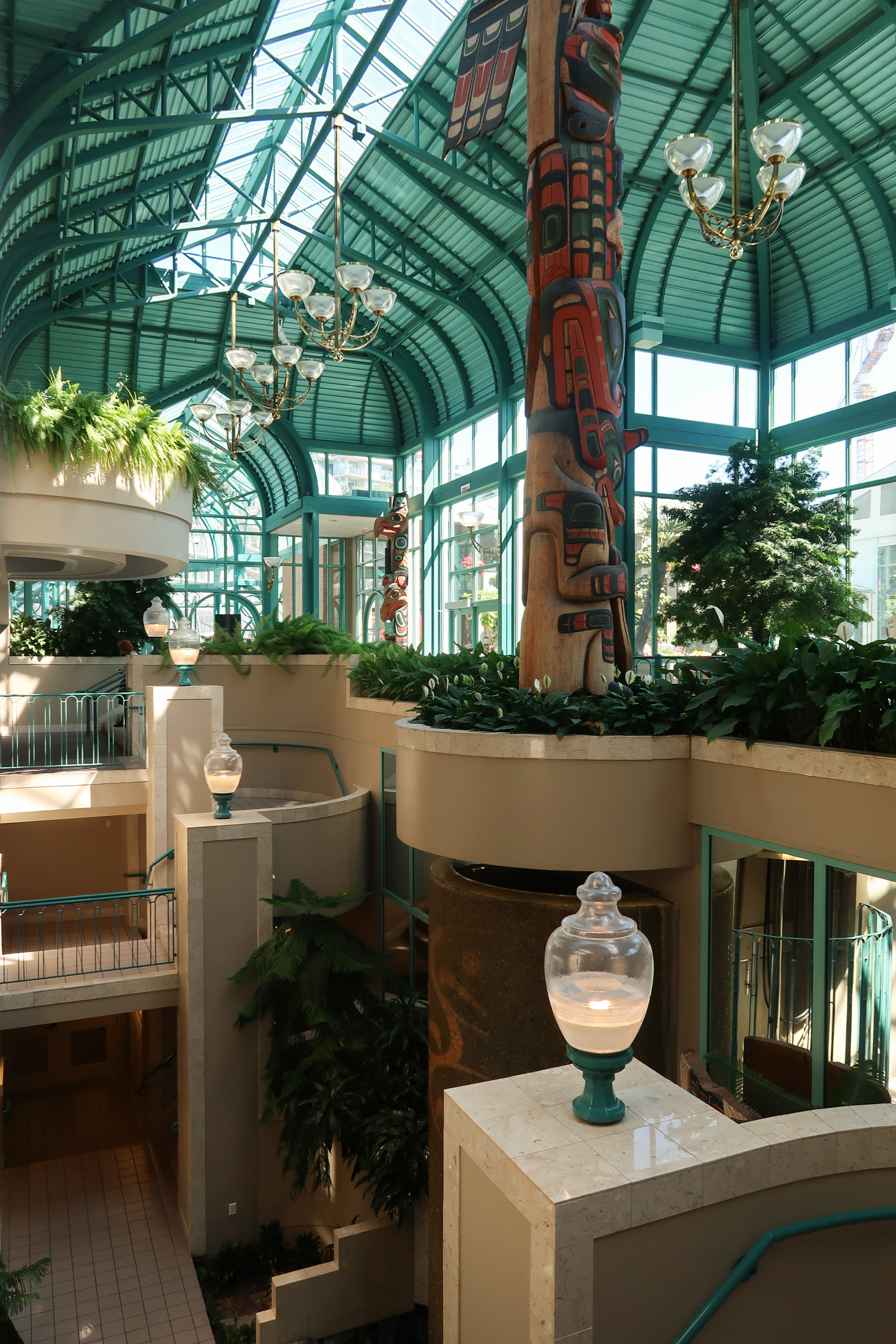 Victoria Conference Centre lobby